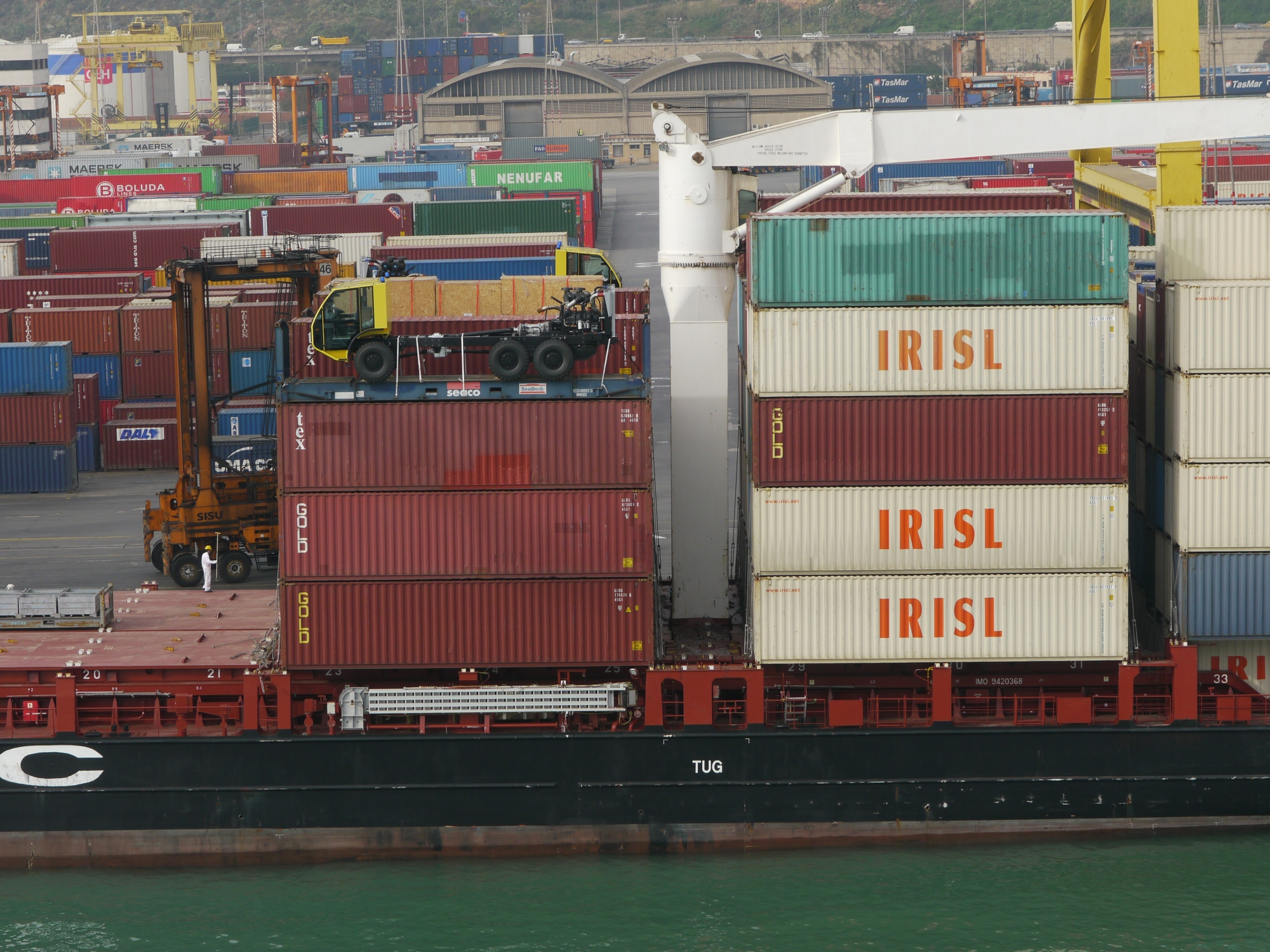 verladene Container-Plattform mit Truck